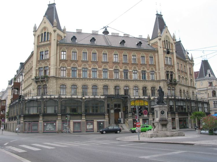 Margaretenhof Wien (Original text : Foto Margaretenhof 13.7.2003)